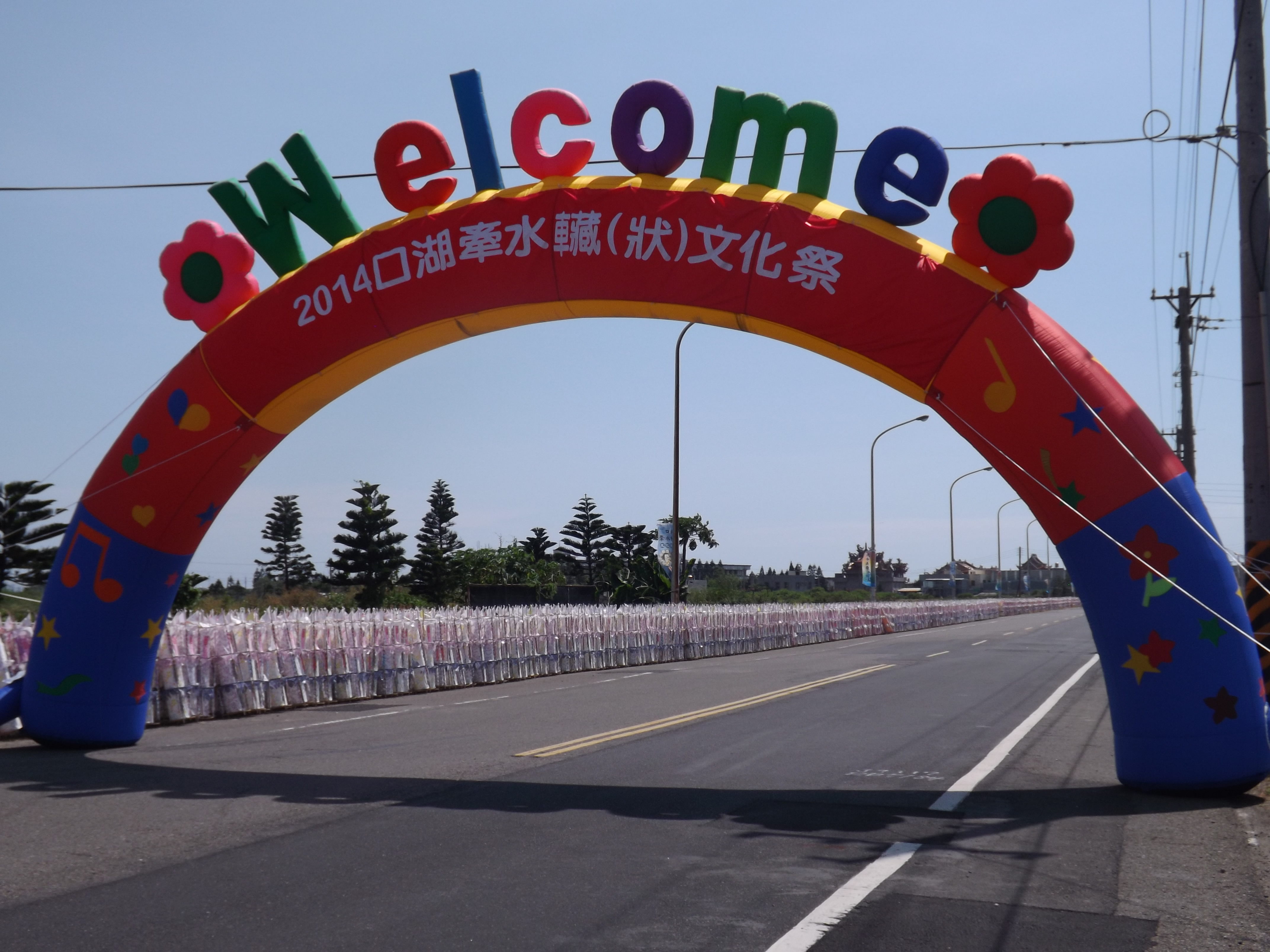 中正路上沿途排放水𰹬